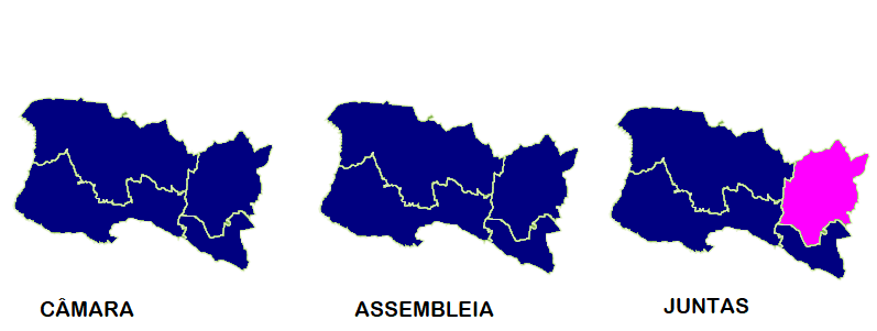 Mapa ilustrativo do partido mais votado por Freguesia em Cascais (2017)